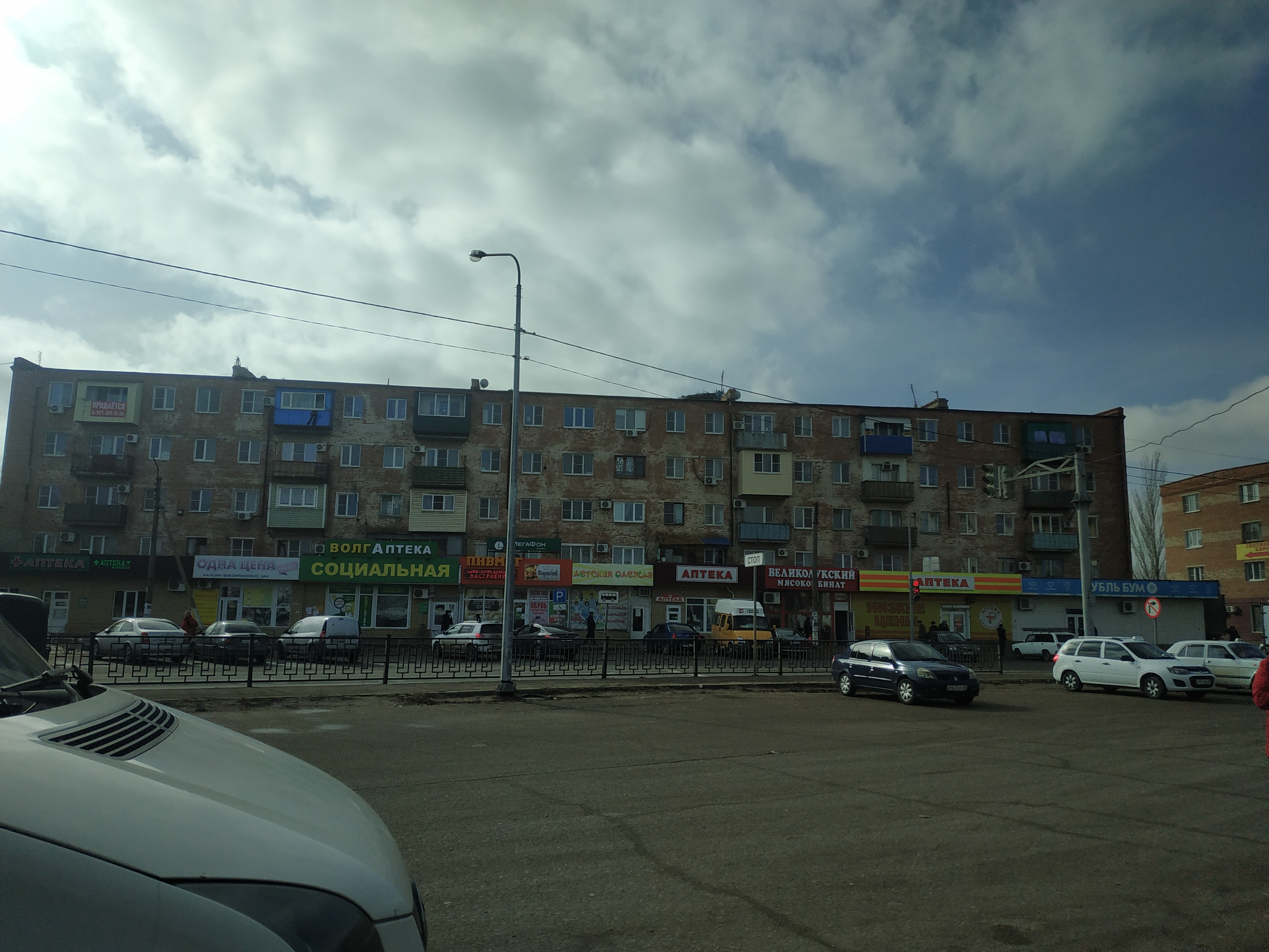 Астраханская область, Икряное